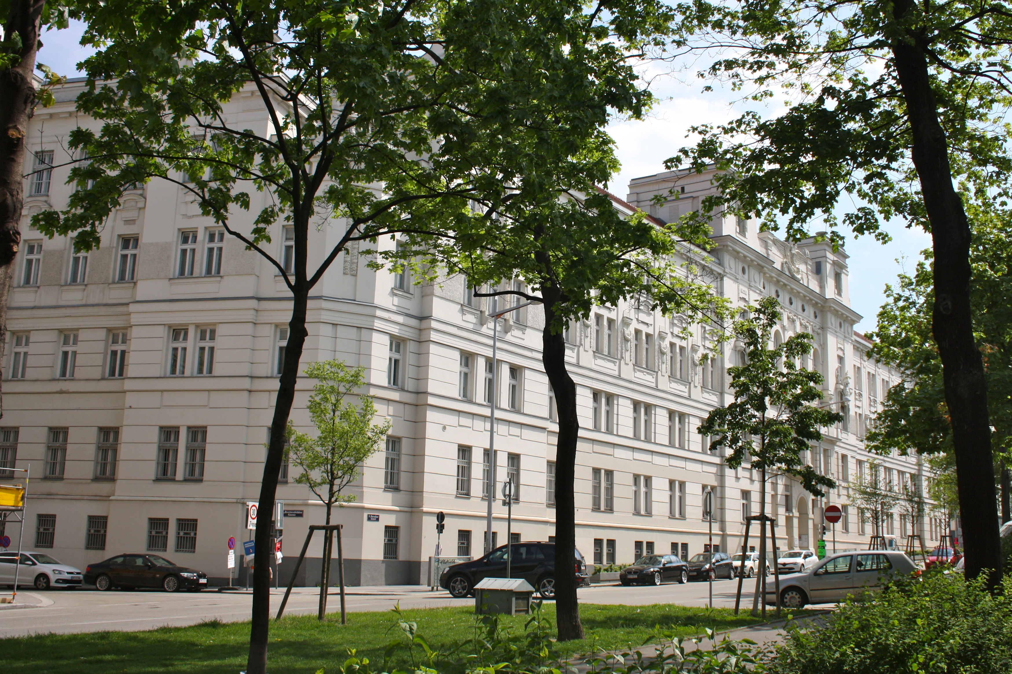 Polizeigebäude Hernalser Gürtel, Wien-Josefstadt.